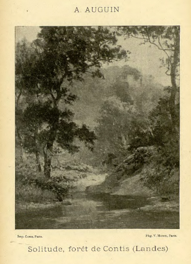 Louis-Augustin Auguin, Solitude, Forêt de Contis (Landes) ; Exposition coloniale de Bordeaux 1895.